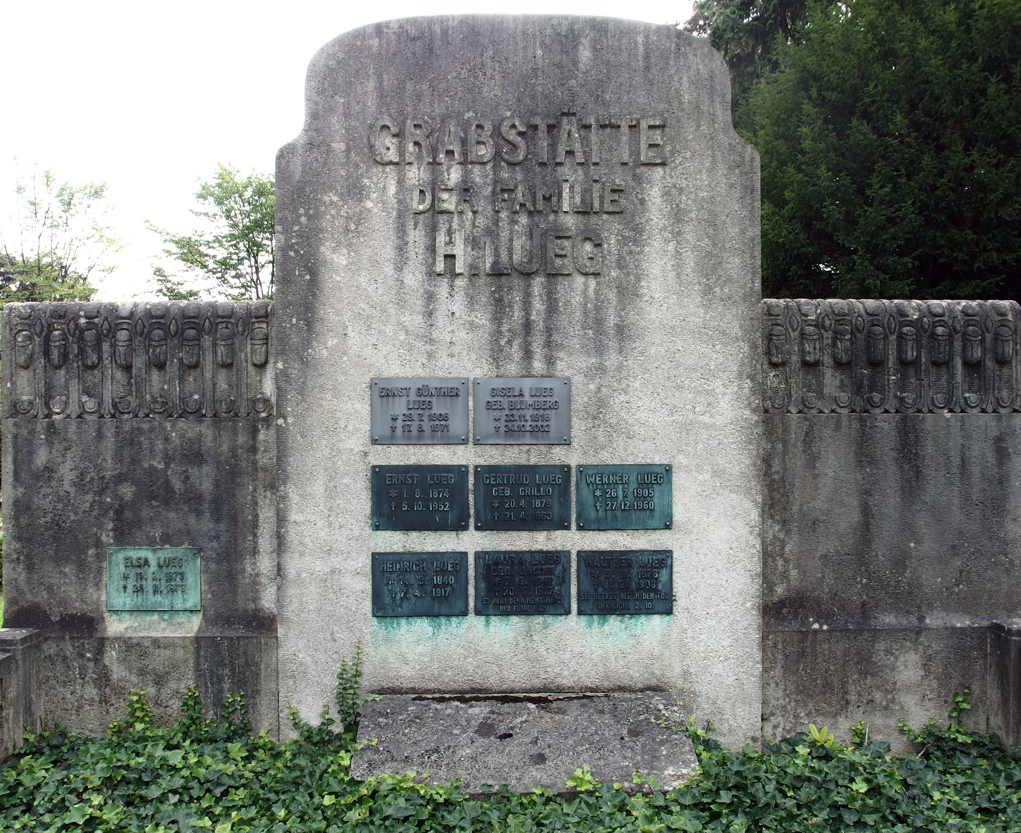 Grabstätte der Familie Heinrich Lueg (1840-1917), Nordfriedhof Düsseldorf